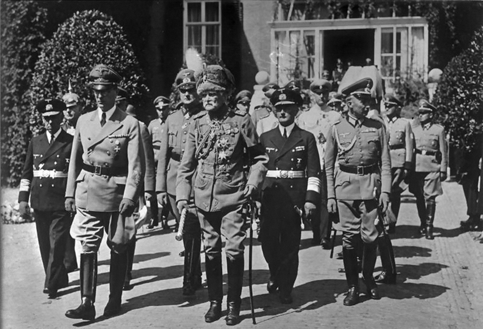 Scherl: Die Beisetzung des ehemaligen Kaisers Wilhelm II. Unter Teilnahme einer großen Trauergemeinde und der Bevölkerung von Doorn wurde Wilhelm II. im Park des Schlosses Doorn mit militärischen Ehren beigesetzt. UBz: Reichsminister Dr. Seyß-Inquart, neben ihm Generalfeldmarschall v. Mackensen. In der 2. Reihe v.l. Admiral Canaris für den Chef des Oberkommandos der Wehrmacht, General der Flieger Christiansen für den Reichsmarschall (fast völlig verdeckt), Generaloberst Haase für den Oberbefehlshaber des Heeres und Admiral Densch als Vertreter für den Oberbefehlshaber der Kriegsmarine. Scherl Bilderdienst (Fritz) Juni 1941 "Fr" OKW ADN-ZB: Die Niederlande während der faschistischen deutschen Besetzung, Juni 1941. Der ehemalige deutsche Kaiser Wilhelm II (geb. 27.1.1859) starb am 4.6.1941 in Doorn, seinem niederländischen Exil. Während der Beisetzung im Park des Schlosses Doorn 1.R.v.l. Reichsminister Arthur Seyß-Inquart und Generalfeldmarschall August von Mackensen, 2.R.v.l. Admiral Wilhelm Canaris, Generaloberst Kurt Haase und Admiral Herman Densch. Aufnahme: Fritz Information added by Wikimedia users.Korrektur:Richtige Schreibweise des Namens ist Hermann Densch Correction:The correct spelling is Hermann Densch